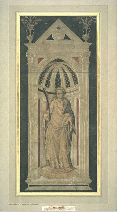 Ghiberti, Etude de la statue de Saint Etienne d'Orsanmichele